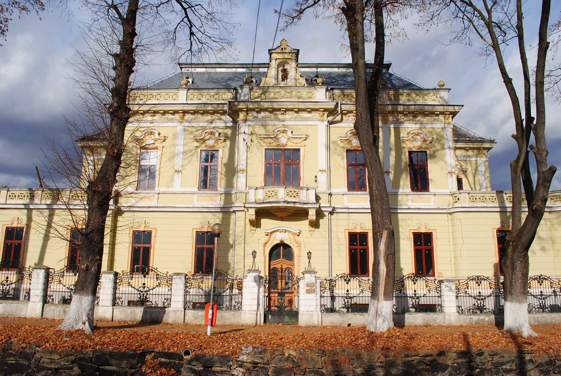 Ansamblul rural "Centrul istoric" sec. XVIII - XIX